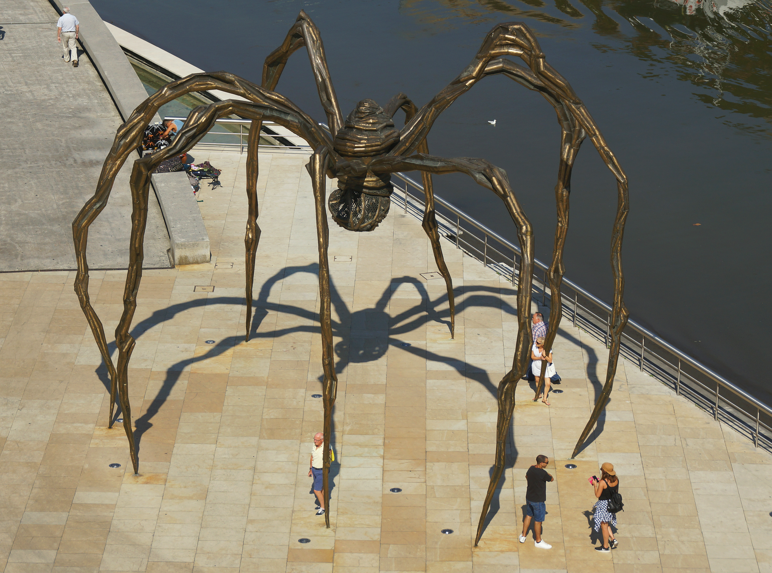 Maman (1999). Spinne über 9 m hoch, aus Vogelperspektive, Bronze-Skulptur einer Spinne von Louise Bourgeois vor Guggenheim-Museum am Fluss Nervión Bilbao Spnien Foto Wolfgang Pehlemann DSC00335.jpg